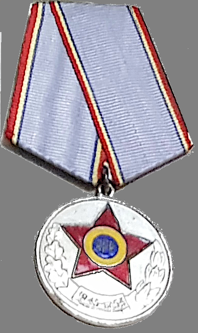 Rumänische Medaille „Wache über das Vaterland“ in der Ausführung von 1957.